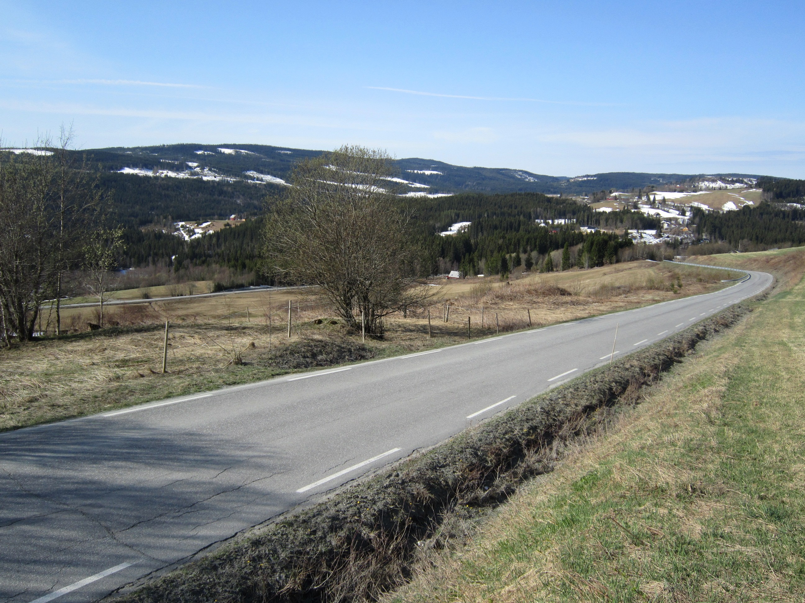 Seegårdsveien (fylkesvei 2414, tidl. 160) like nedenfor Seegård kirke